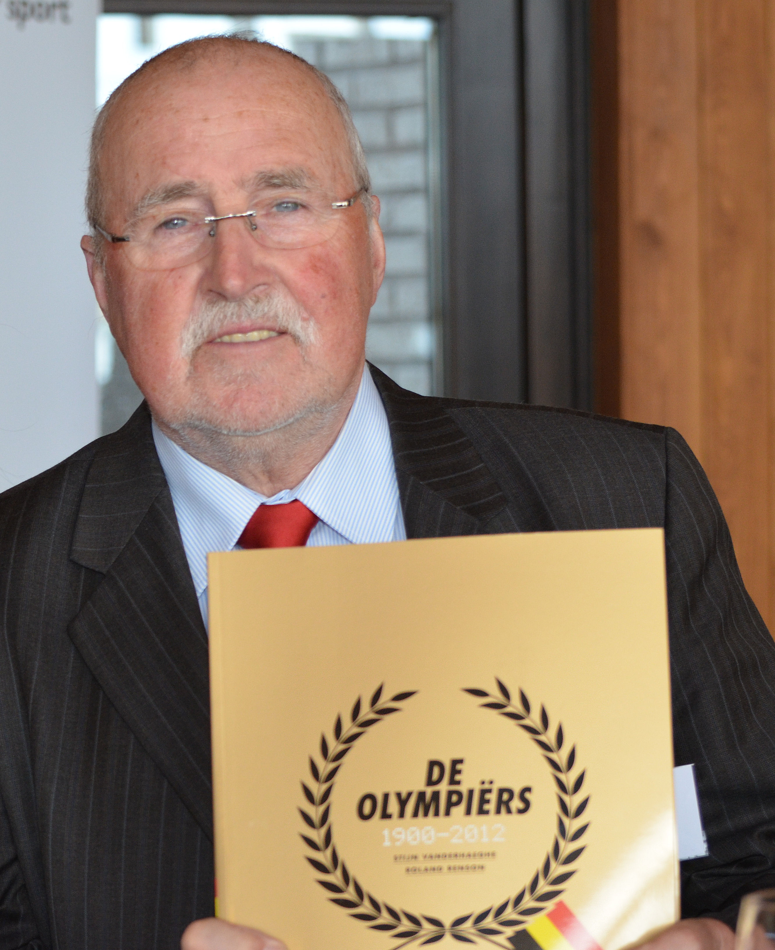 Gaston Roelants.In het kader van erfgoeddag 2012 werden op zondag 22 april 2012 in het Sportimonium te Hofstade (Zemst) enkele Olympische helden geëerd. Zo spraken ondermeer Gaston Roelants (voorzitter van de Vereniging van Belgische Olympiërs) en Jacques Rogge een erewoord uit, werd een eregalerij onthuld met foto’s en interactieve filmpjes van alle medaillewinnaars. Daarnaast werd het boek ‘Olympiërs 1900-2012’ gepresenteerd.